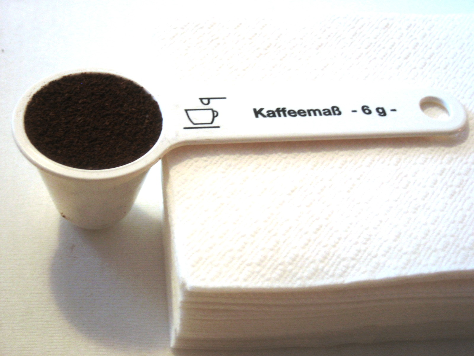 Das Kaffeelot, ein Maß für gemahlenen Kaffee